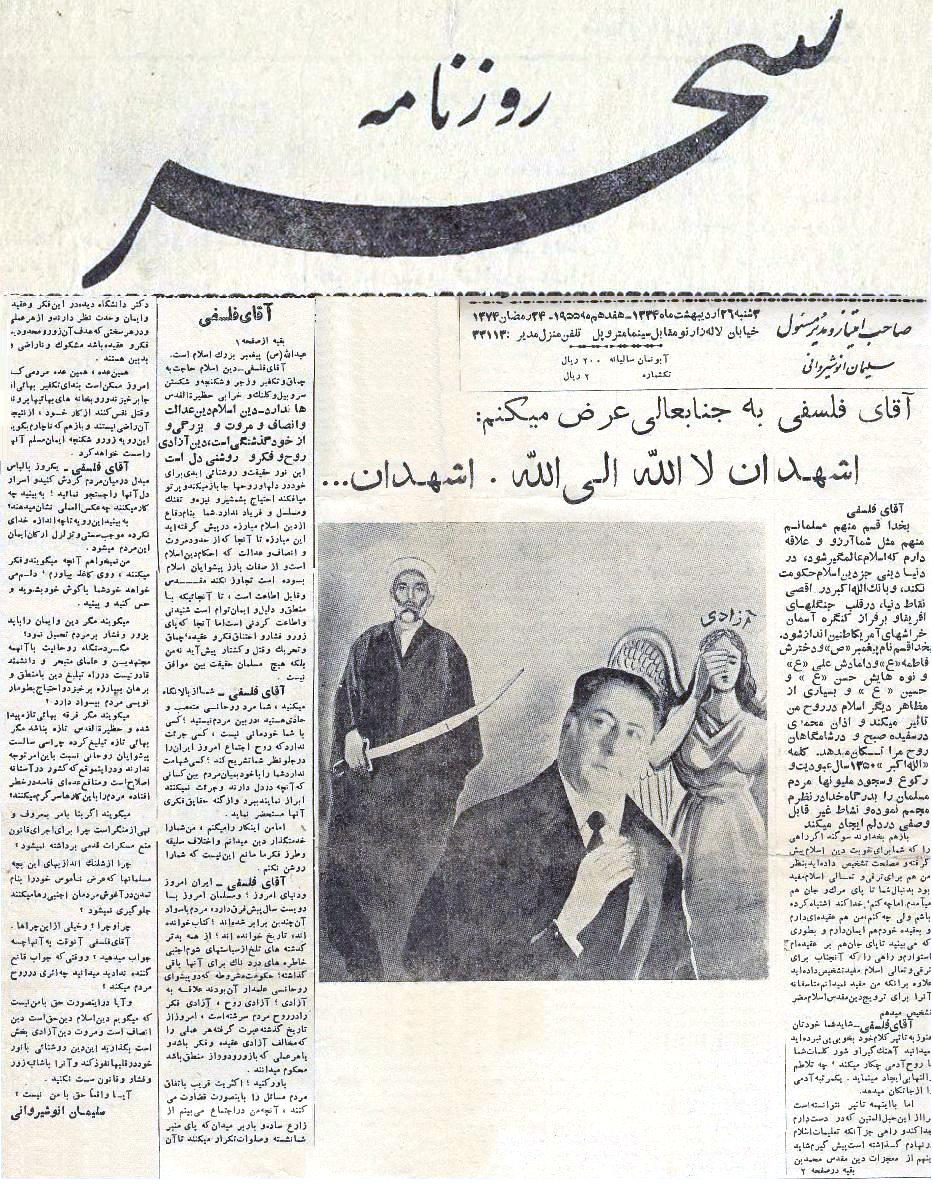 انتقاد سليمان انوشيرواني صاحب امتياز و مدير مسئول روزنامه سحر از فلسفي. سه شنبه 26 ارديبهشت ماه 1334